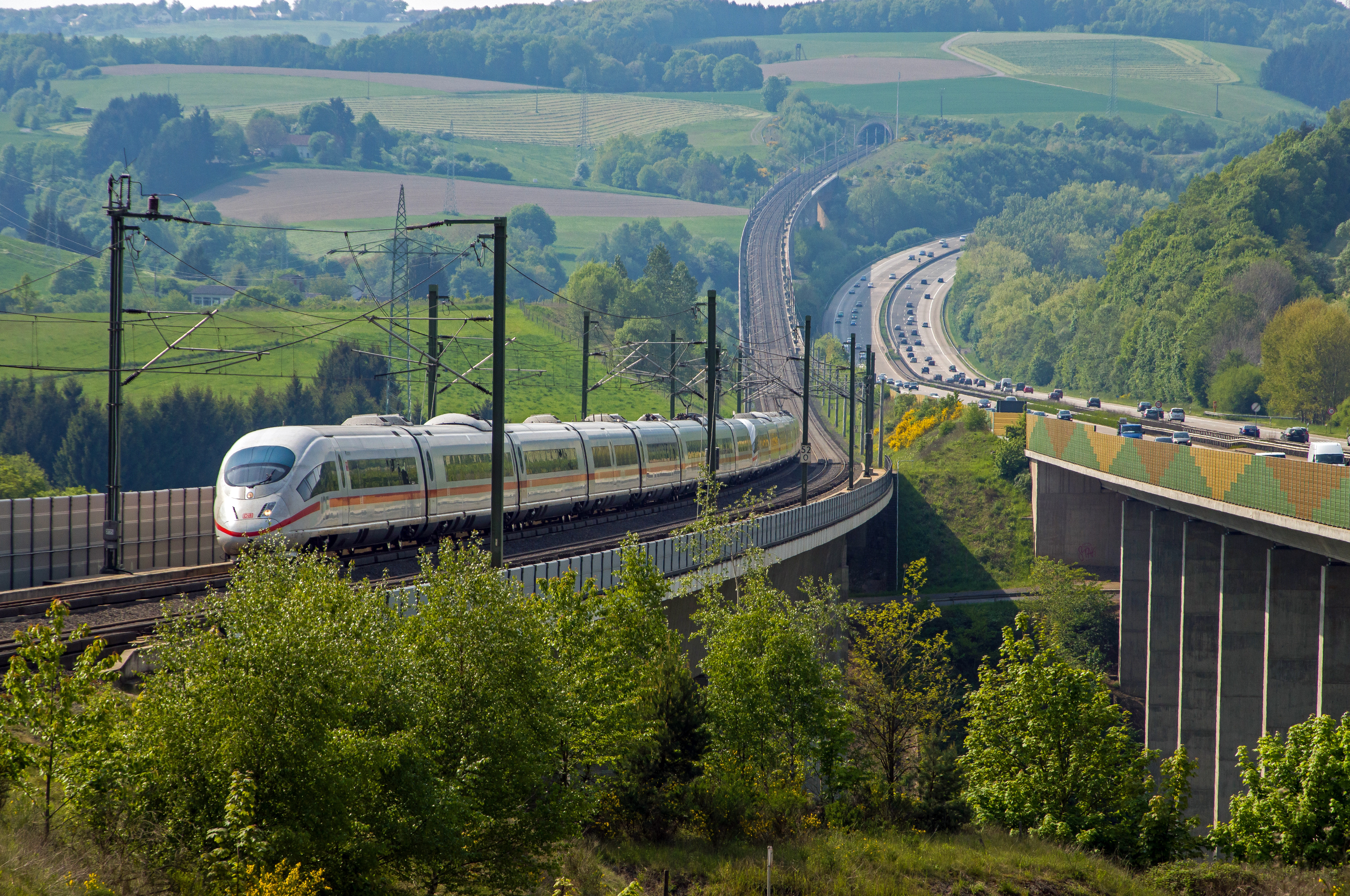 Langs Autobahn 3 de HSL tussen Köln en Frankfurt spoedt de ICE zich met 300 km/h naar Frankfurt.